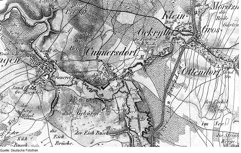 Original image description from the Deutsche Fotothek Ottendorf-Okrilla-Cunnersdorf. Oberreit, Sect. Großenhain, 1841/43